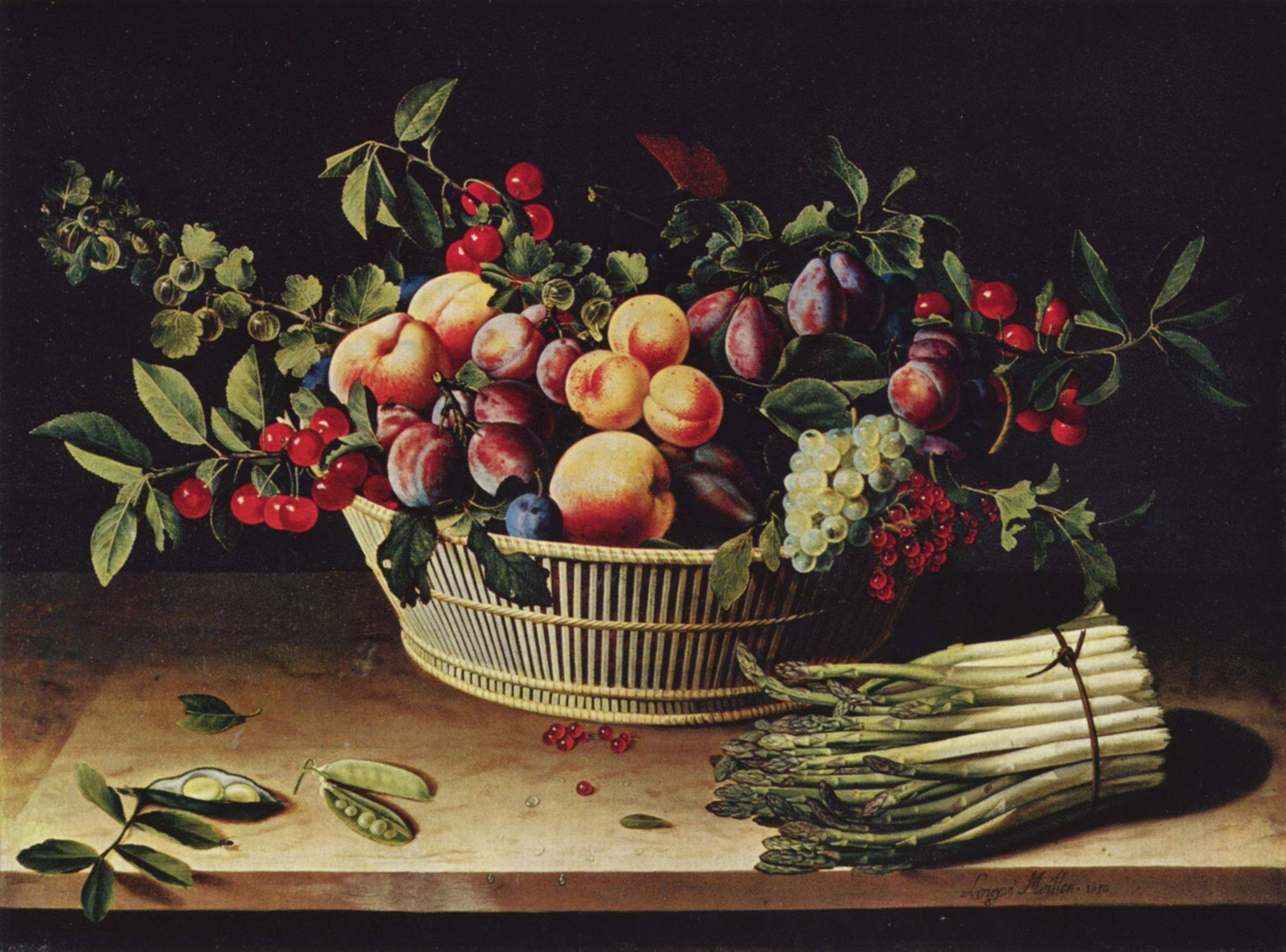 Still Life